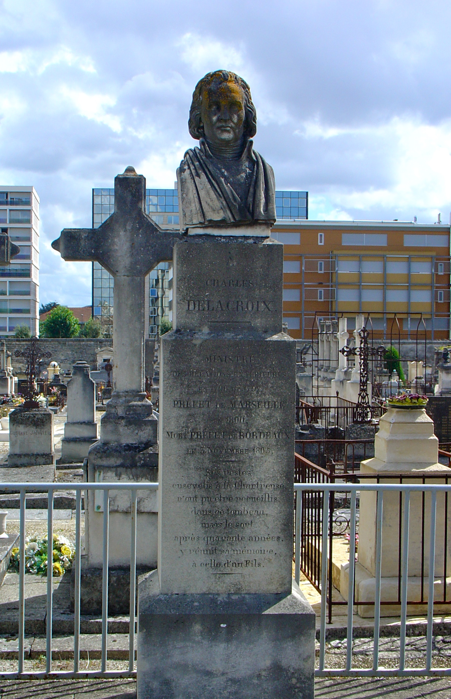 Tombe Charles Delacroix cimetière de la Chartreuse Bordeaux